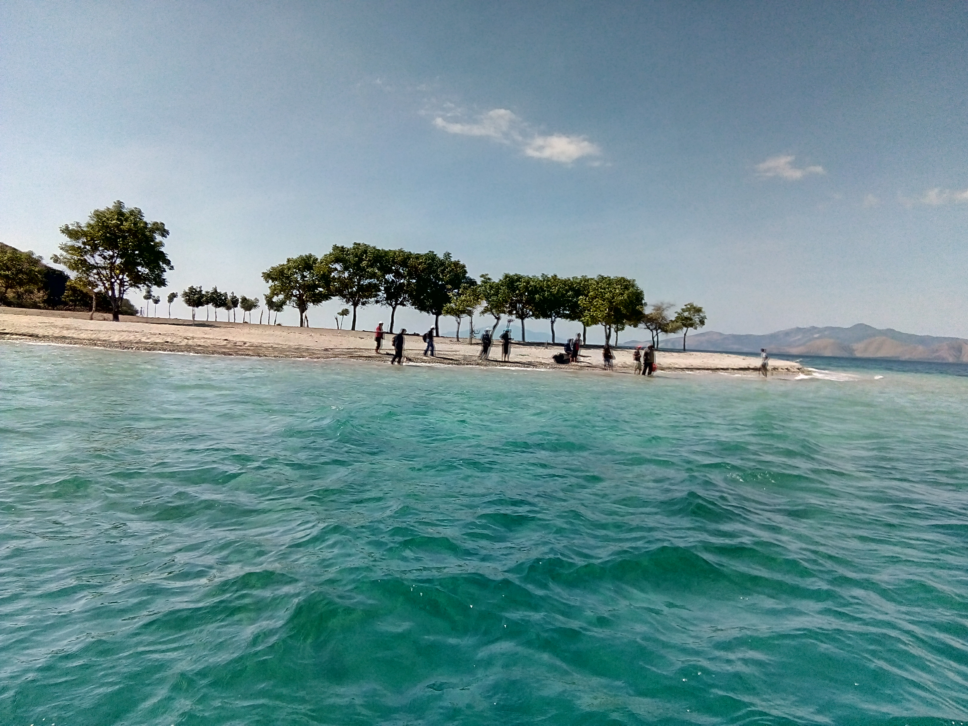 Pulau Kinde Terletak di Utara Flores, Desa Tendakinde Kecamatan Wolowae Kabupaten Nagekeo Provinsi Nusa Tenggara Timur